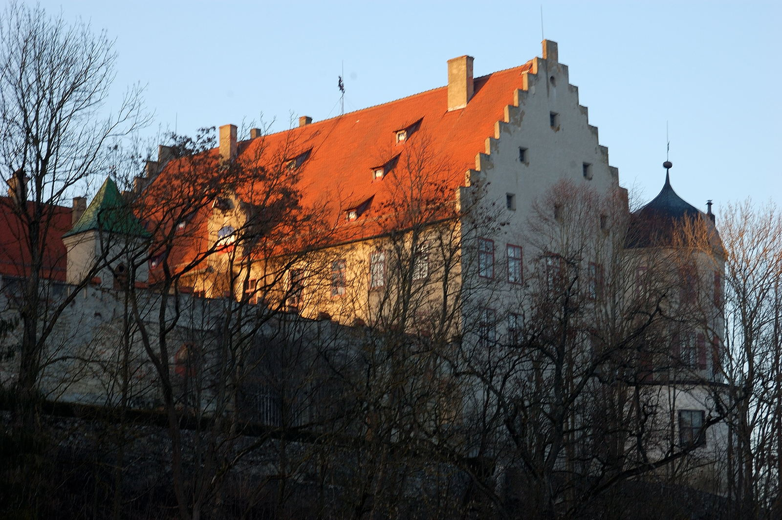 Schloss Warthausen Warthausen, Baden-Württemberg, Germany